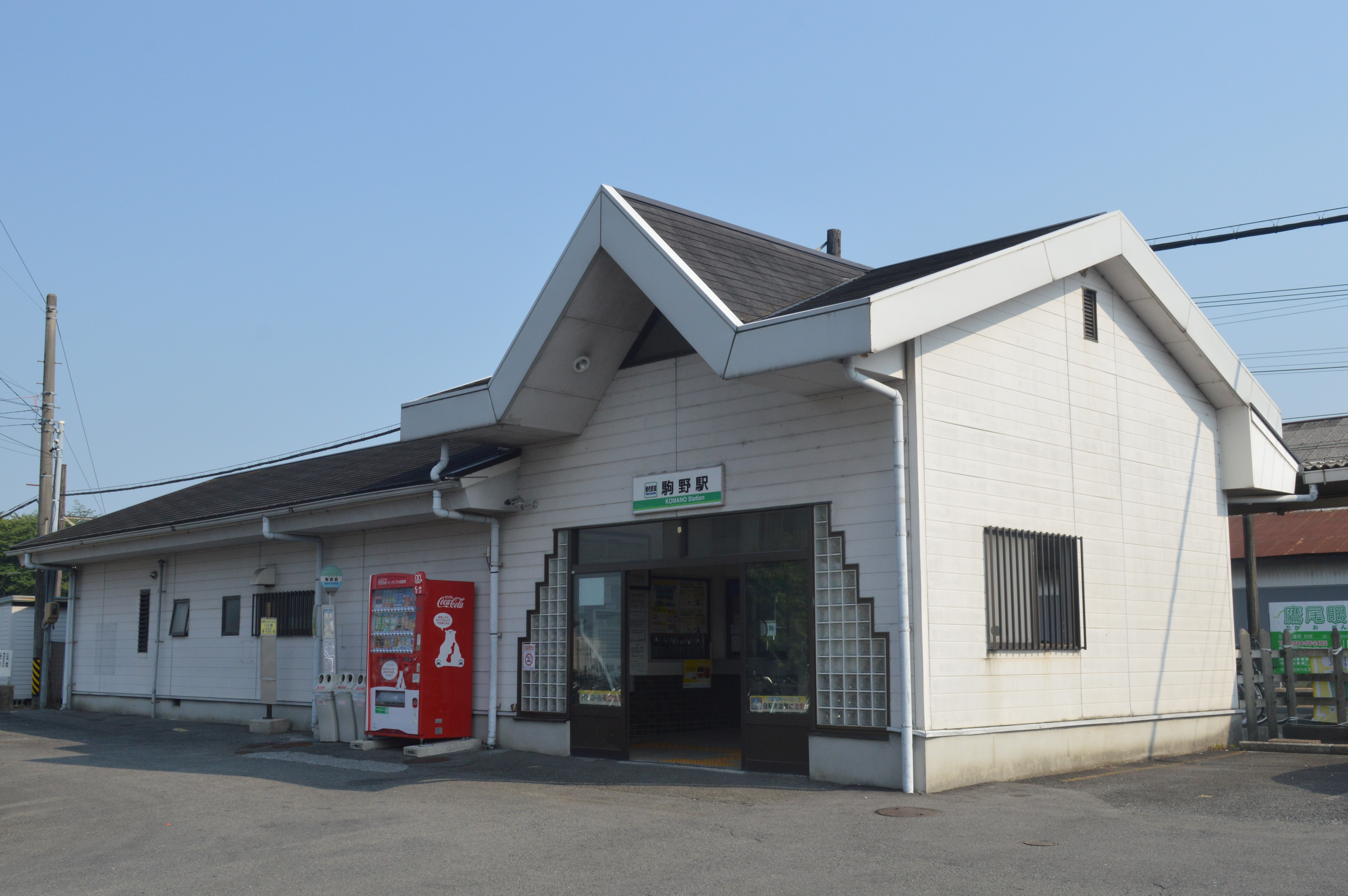 岐阜県海津市にある養老鉄道養老鉄道線駒野駅。